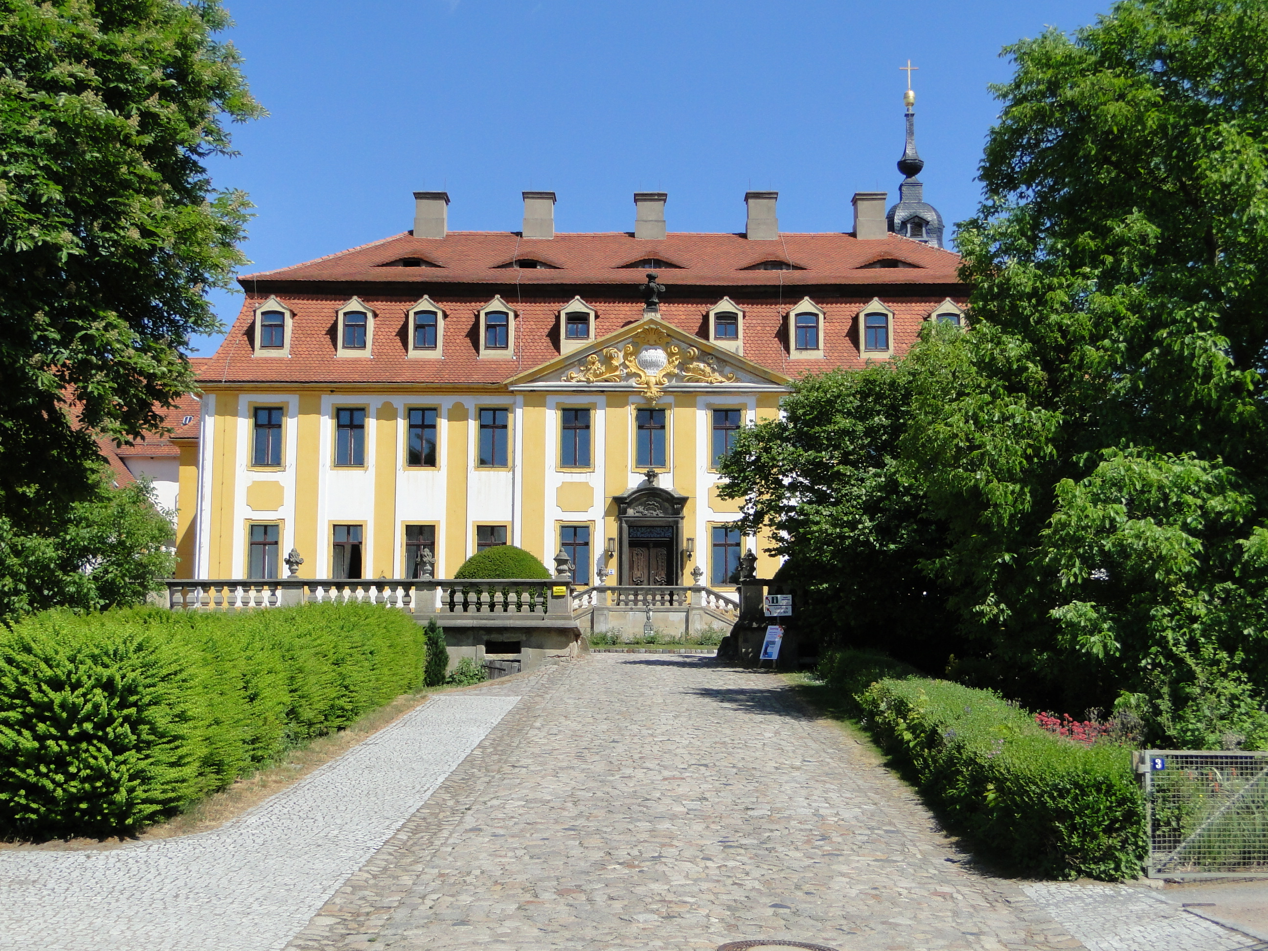 Kulturdenkmal Schloss Seußlitz Zugang